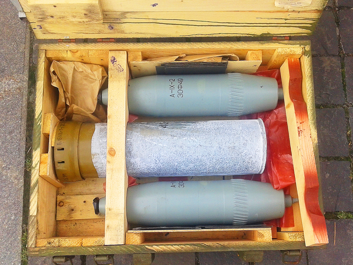 Основні боєприпаси «Нони» осколково-фугасний снаряд 30Ф49, вилучені у терористів під час антитерористичної операції на Донбасі. Музей Великої Вітчизняної війни. Київ. Україна